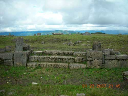 San Pedro - Pacopampa